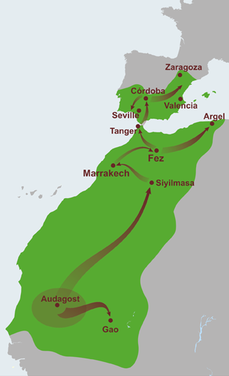 Mapa que amosa a expansión almorávide nos séculos XI e XII.